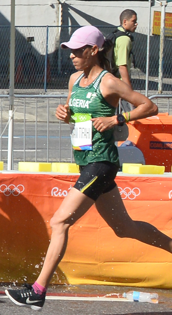 Passage du marathon des jeux olympiques de Rio 2016 dans le centre de Rio